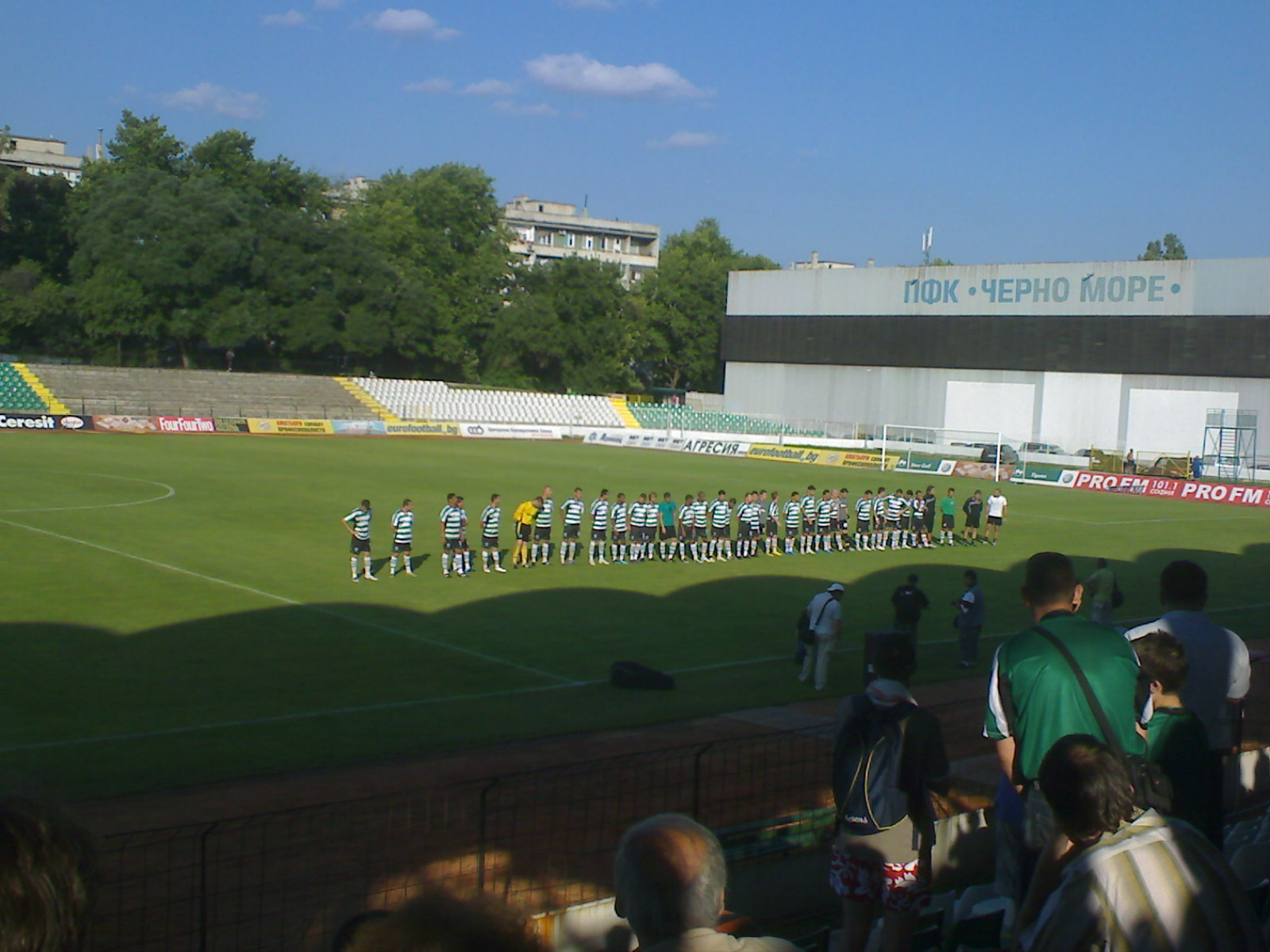 Черно Море Варна представя отбора за новия сезон